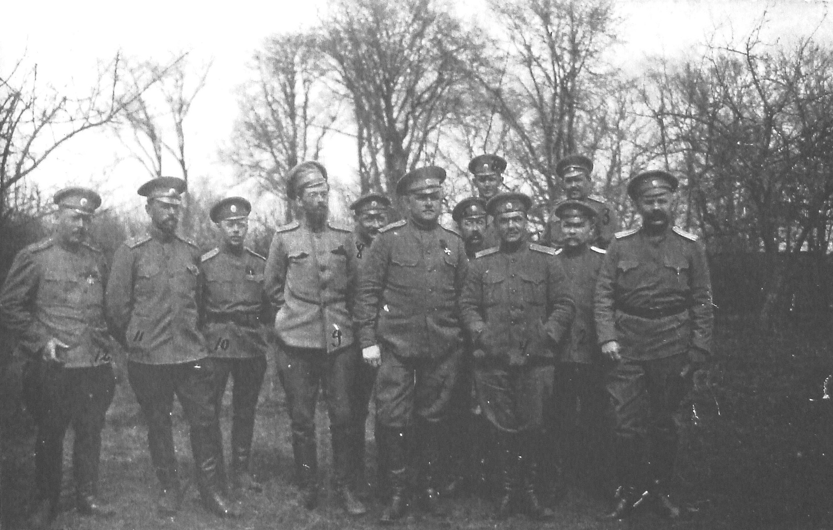 Начальник штаба 2-й Финляндской стрелковой дивизии полковник Шпилько. Дивизионный врач, статский советник Деполович. Штабс-капитан С. П. Серебренников. Командир полка, полковник В. Ф. Попов. Подполковник В. Ф. Коптев. Поручик А. А. Тюнегов. Командир бригады 2-й Финляндской стрелковой дивизии полковник Шиллинг. М. Ф. Печенов (капитан). Подполковник М. Ф. Кретчмер. Капитан А. И. Еленин. Подполковник В. И. Тенберг. Капитан Н. К. Безсонов.